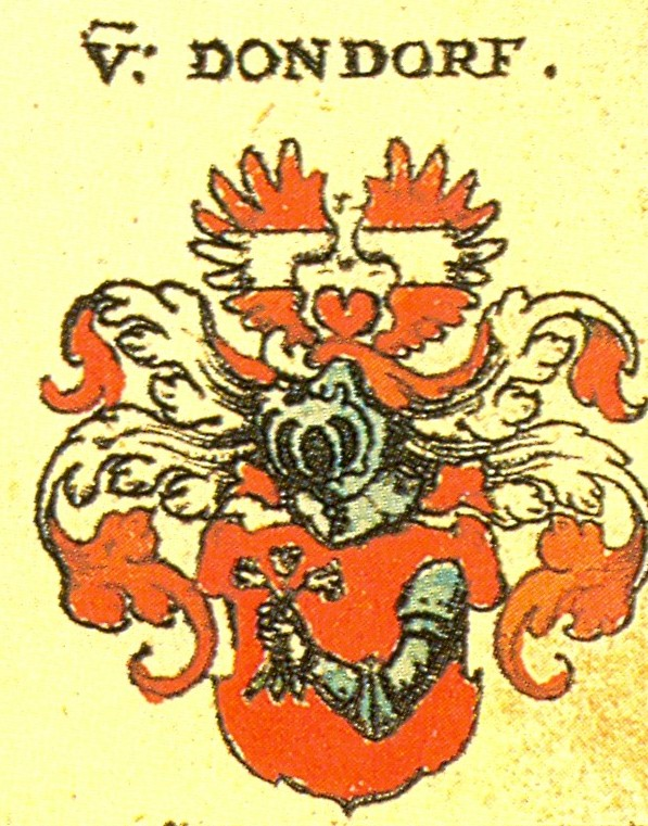 Ritterschaft und Adel in Franken Wappen der Familie von Donndorf (Tanndorf).